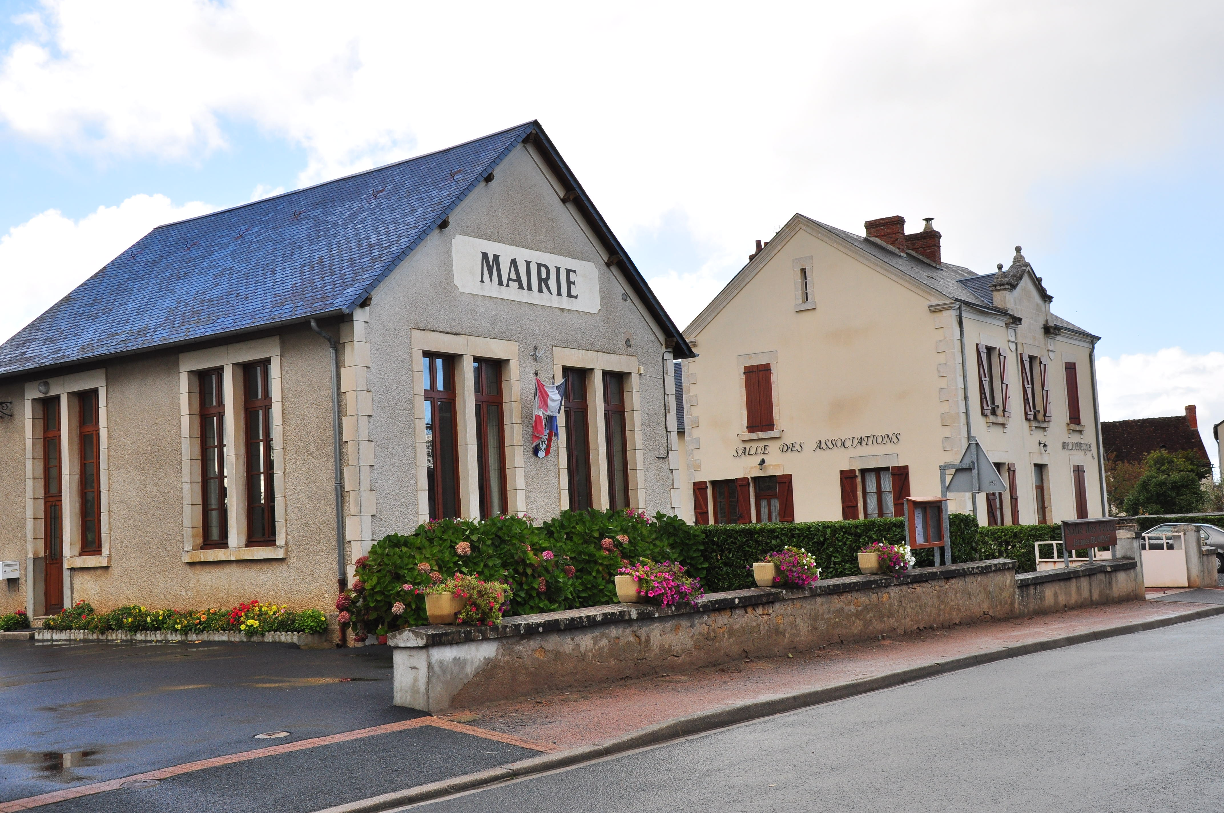 Mairie de Pommiers (Indre)